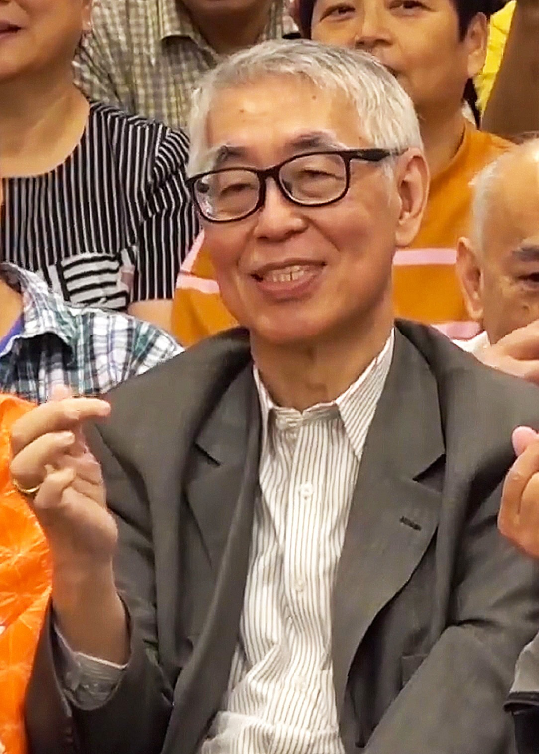 中文（香港）: 蔡和平在1965年留學歸來加入新加坡電視台工作，1967年受聘於剛開台的香港電視廣播有限公司，其是電視廣播有限公司開台時最年輕的編導，製作了家傳戶曉之現場綜合長壽節目《歡樂今宵》等節目